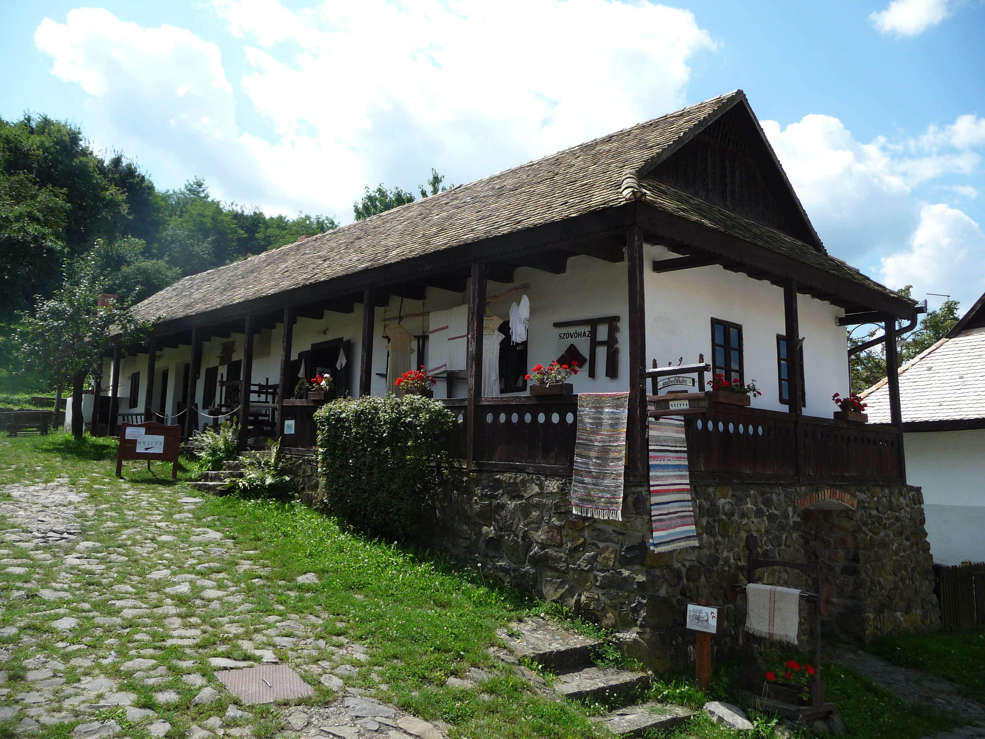 Hollókői szövőház, Kossuth u. 94.